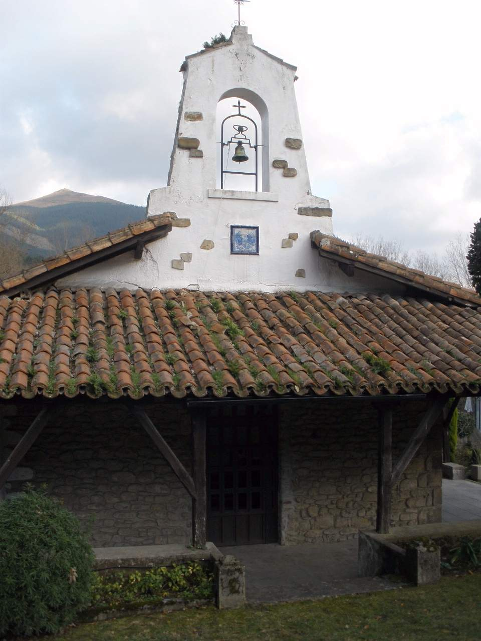 Ermita de San Miguel de Anuntzibai (Llodio, Álava)